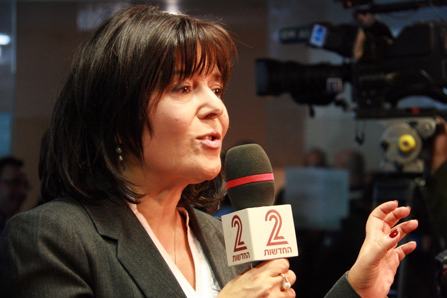 רינה מצליח, ערוץ 2. צילום: איציק אדרי